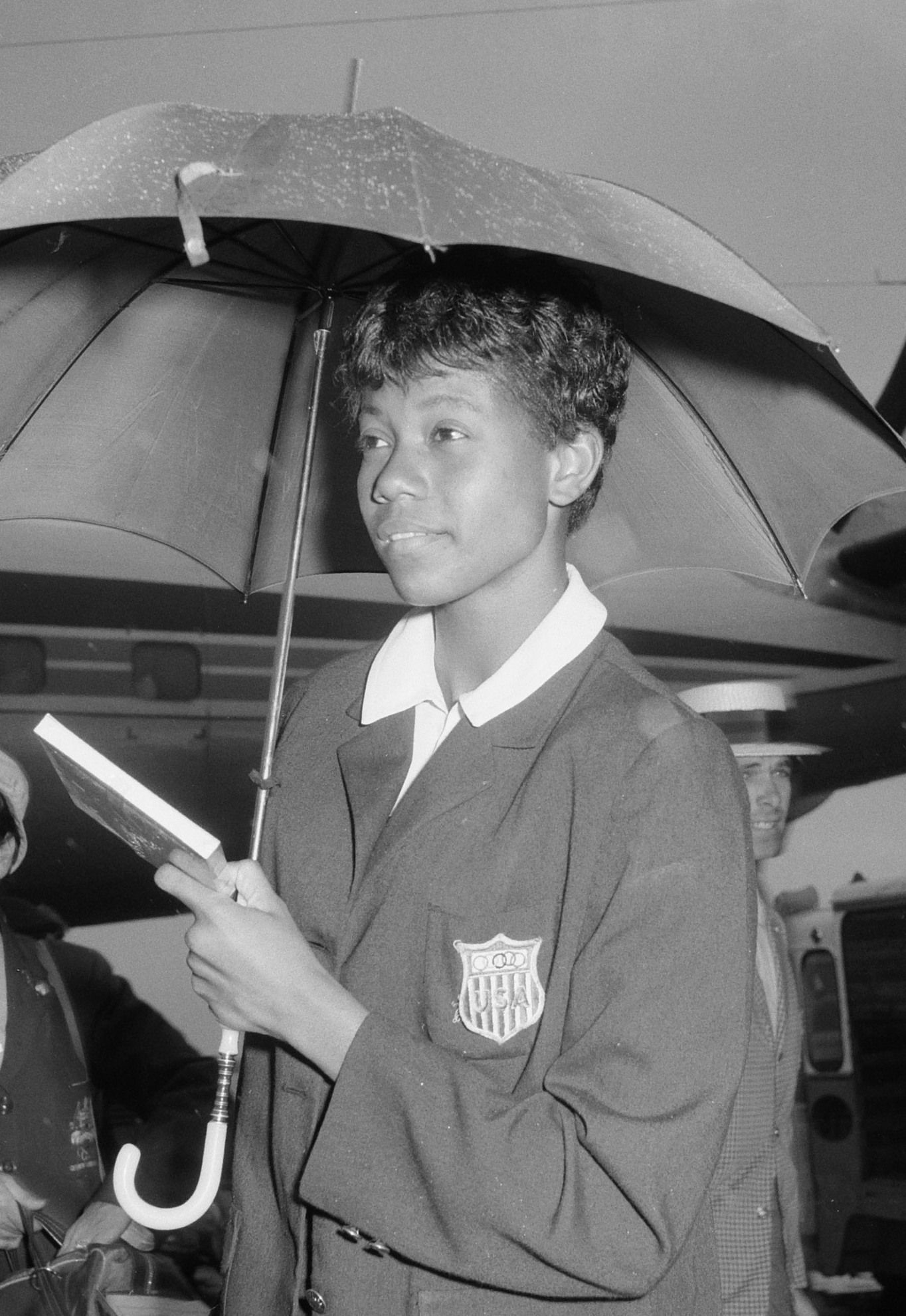 Aankomst Amerikaanse Olympische atleten op Schiphol, W. Rudolph poseert onder paraplu voor de fotografen